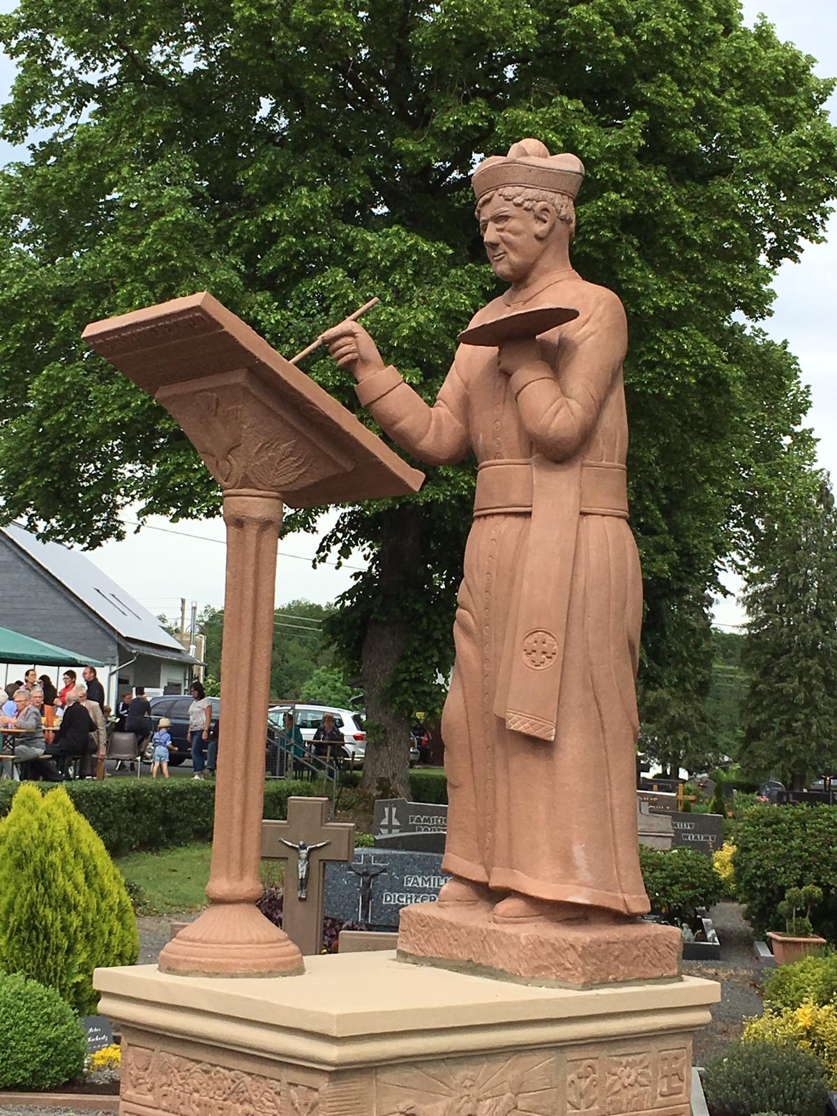 Eschfeld; Kirchplatz St. Lucia. Am 09. Juni 2019 wurde vor der katholischen Kirche St. Lucia in Eschfeld das „Pfarrer-März-Denkmal“ eingeweiht. Die Skulptur aus Sandstein wurde vom Bildhauer Peter Weiland aus Irrhausen gefertigt. Aufnahme v. Arno Fuchs im Juni 2019.